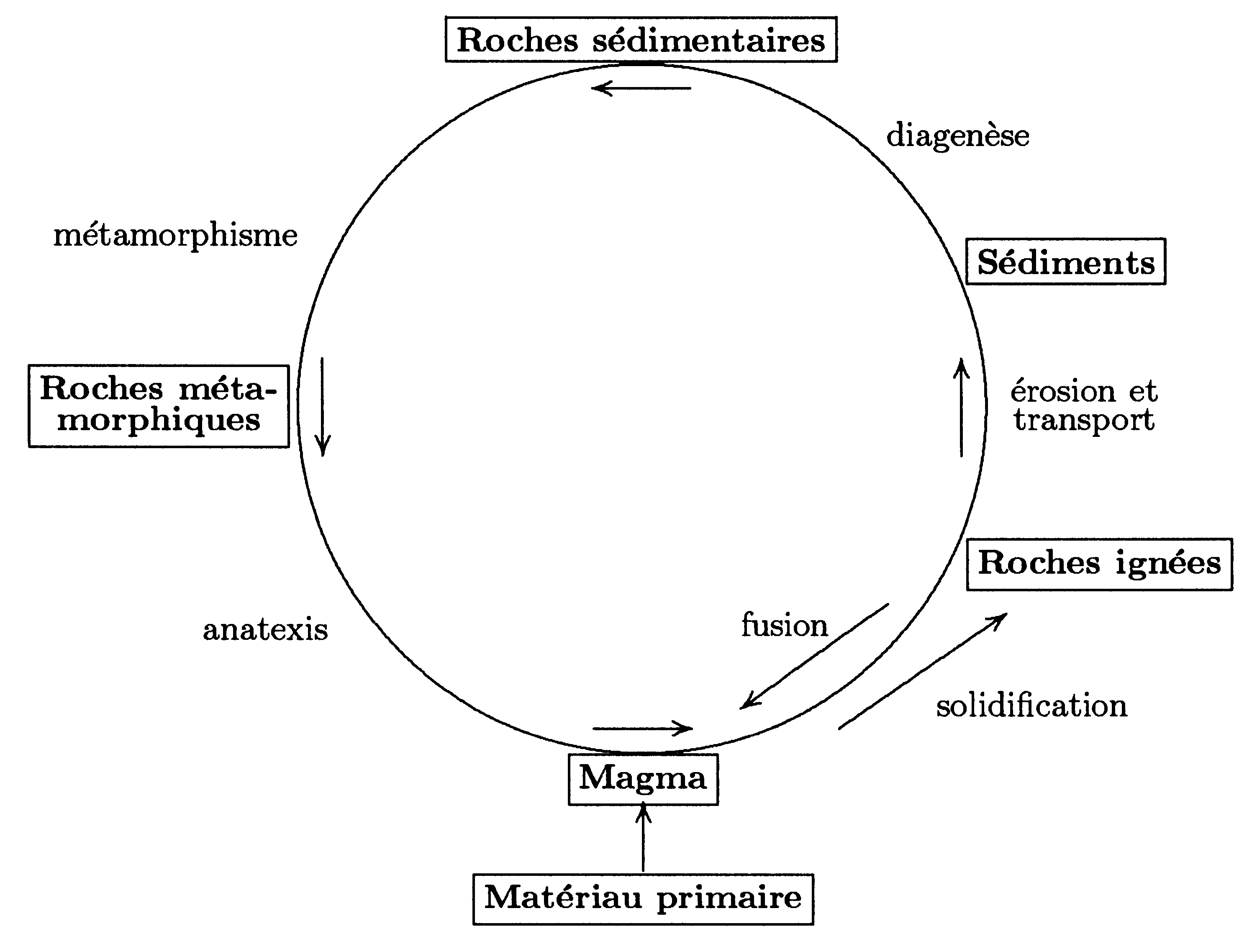 Schéma illustrant le Cycle géologique.